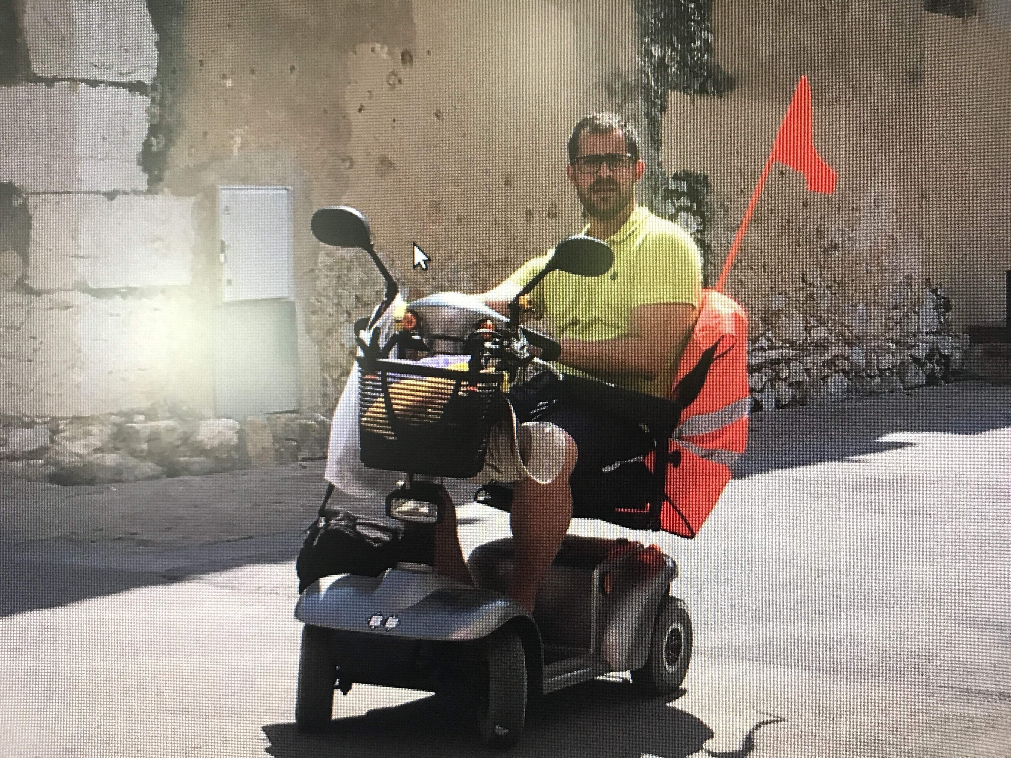 Una persona utilizant un vehicle de mobilitat.